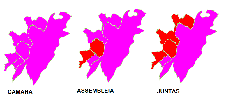 Mapa ilustrativo do partido mais votado por freguesia em Vila Franca de Xira (2017)